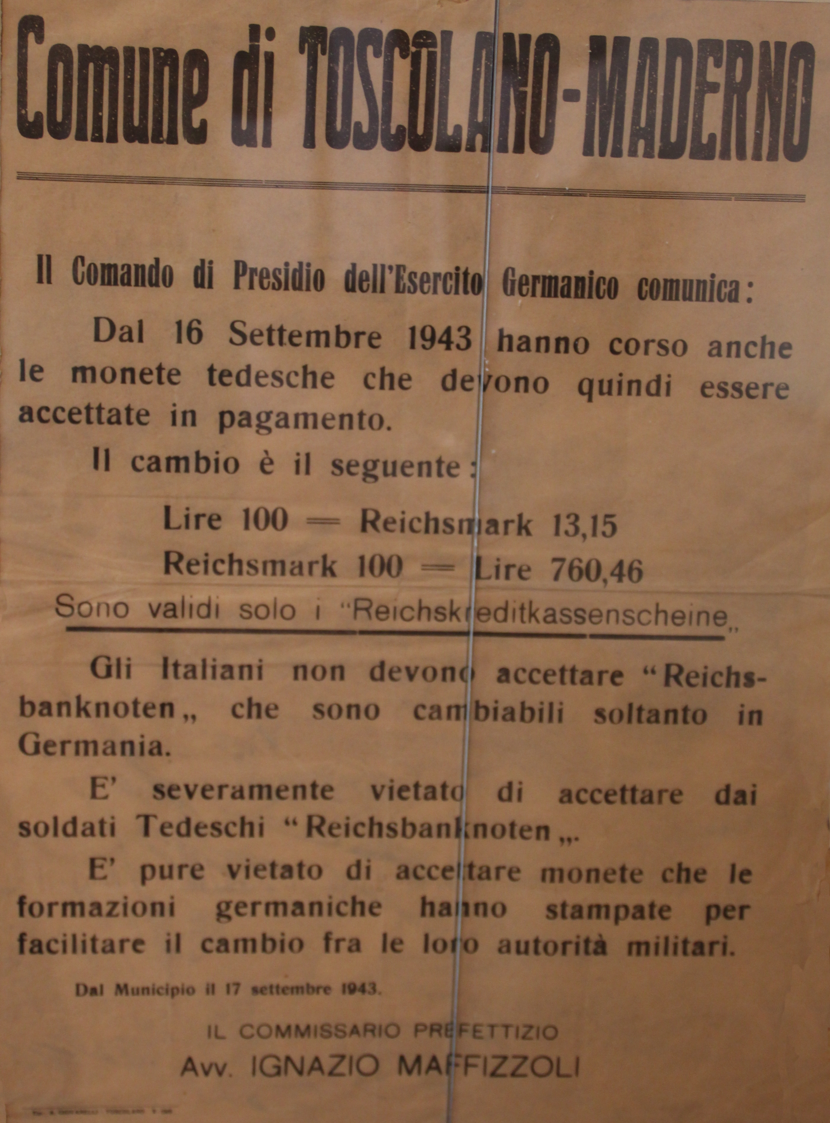 Flugblatt zur Information der italienischen Bevölkerung über den Wechselkurs RM/Lire in der italienischen Sozialrepublik